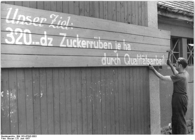 Kleinwanzleben, Parole zur Planerfüllung Zentralbild Biscan-Weiß 25.06.1957 - An der Spitze der Jugend-Brigaden - Die Traktoristen-Brigade V der MTS Kleinwanzleben, Kreis Wanzleben, ist bei der letzten Wertung Bezirkssieger im "Sozialistischen Repubulikswettbewerb der Jugendbrigaden der MTS" geworden und zählt zu den besten Jugendbrigaden in der DDR. Die Brigade hat im letzten Wettbewerbsabschnitt ihren Feldarbeitsplan mit 147 % und ihren Transportplan mit 153 % erfüllt. Bis 30. Oktober will sie den Jahresplan erfüllen und bis Jahresende den Platn mit 125 % übererfüllen. UBz: Die Kollegen der MTS Kleinwanzleben haben sich die Aufgabe gestellt, durch gute Pflegearbeit den Ertrag an Zuckerrüben beträchtlich zu steigern. An der Spitze dieser Bewegung steht die Jugend-Brigade V der MTS.